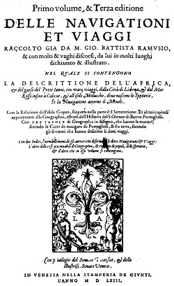 Copertina di "Delle navigationi et viaggi" di Giovan Battista Ramusio